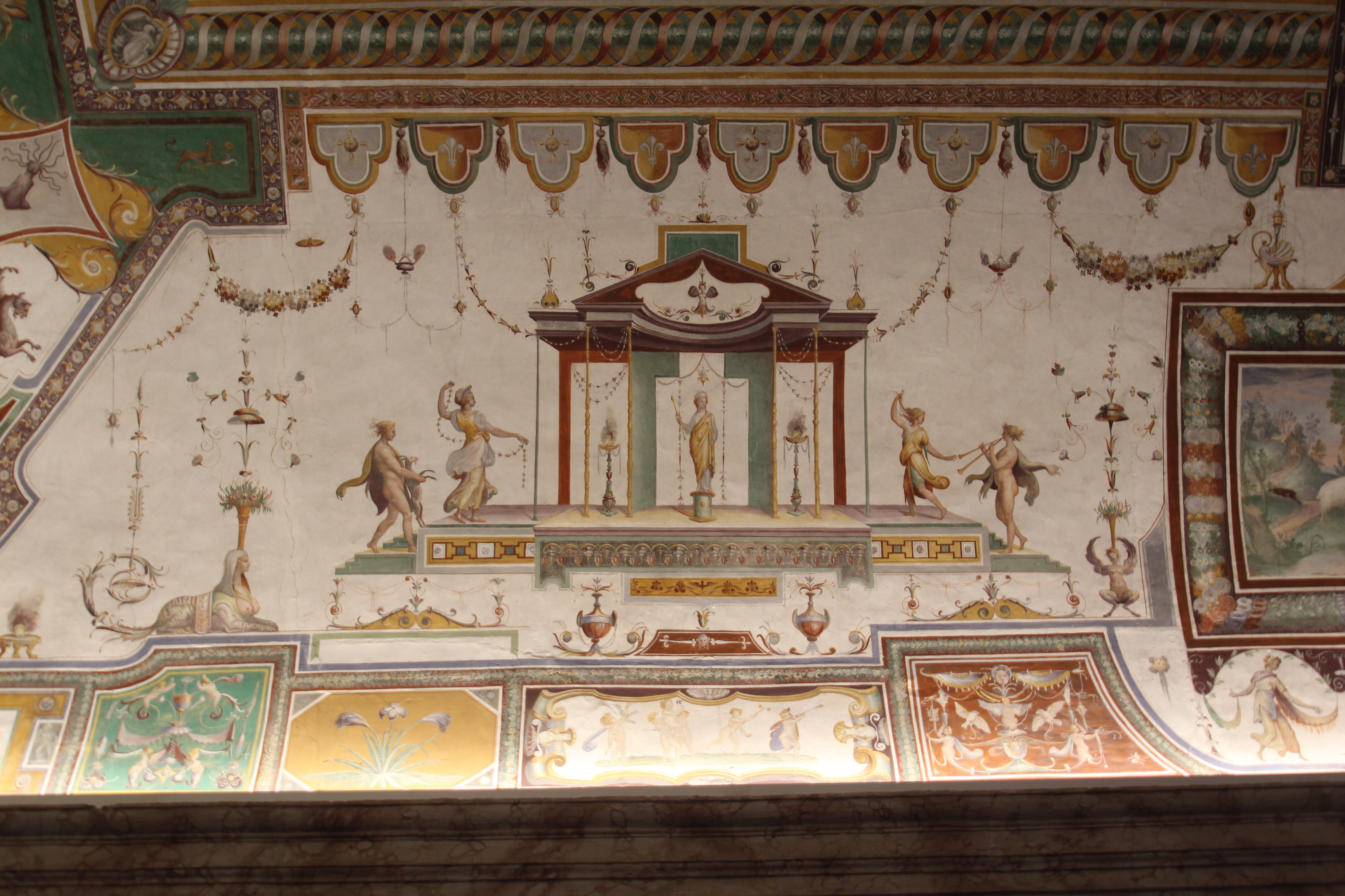 Palazzo Farnese (Caprarola): una delle decorazioni del soffitto